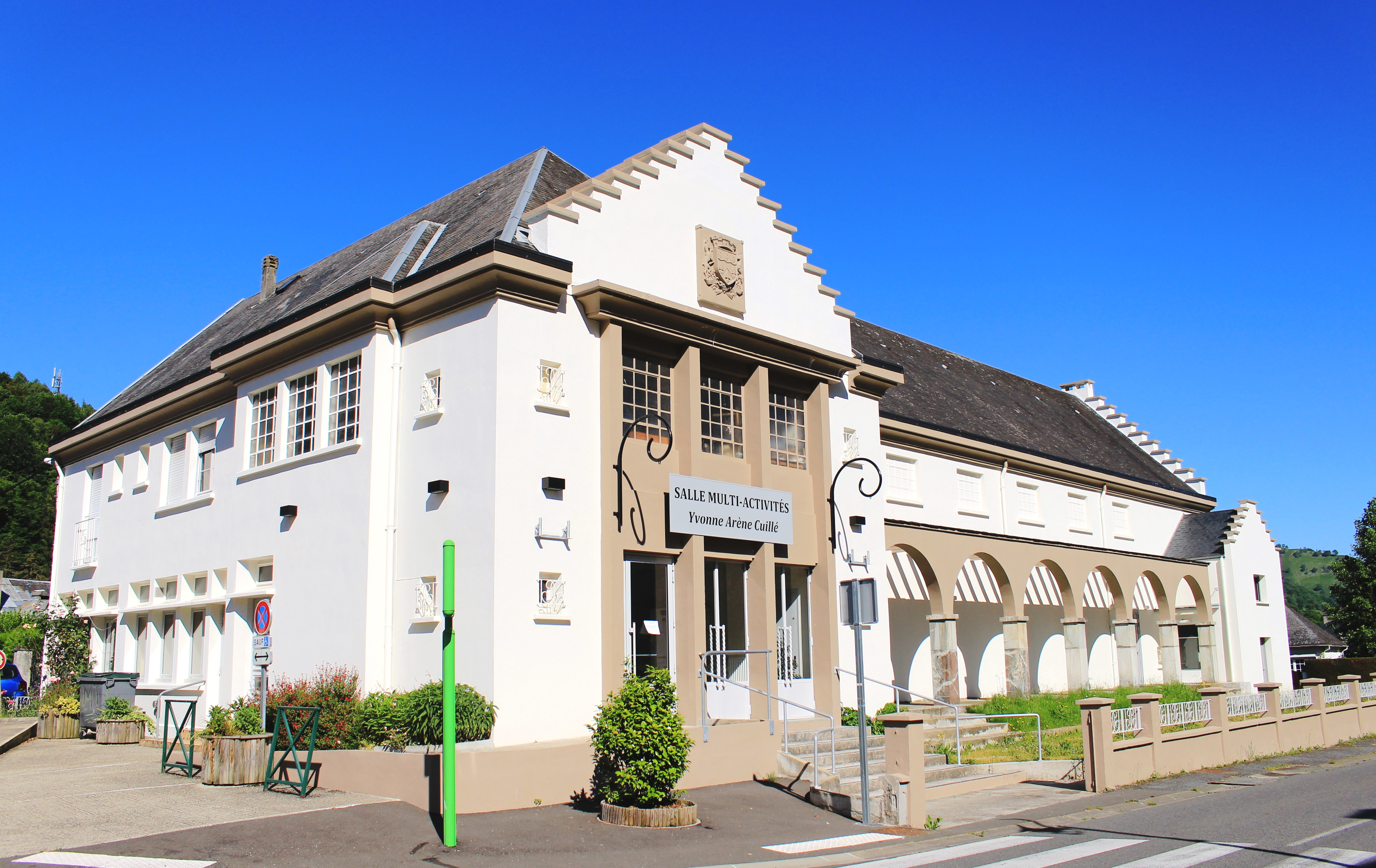 Salle des fêtes de Campan (Hautes-Pyrénées)